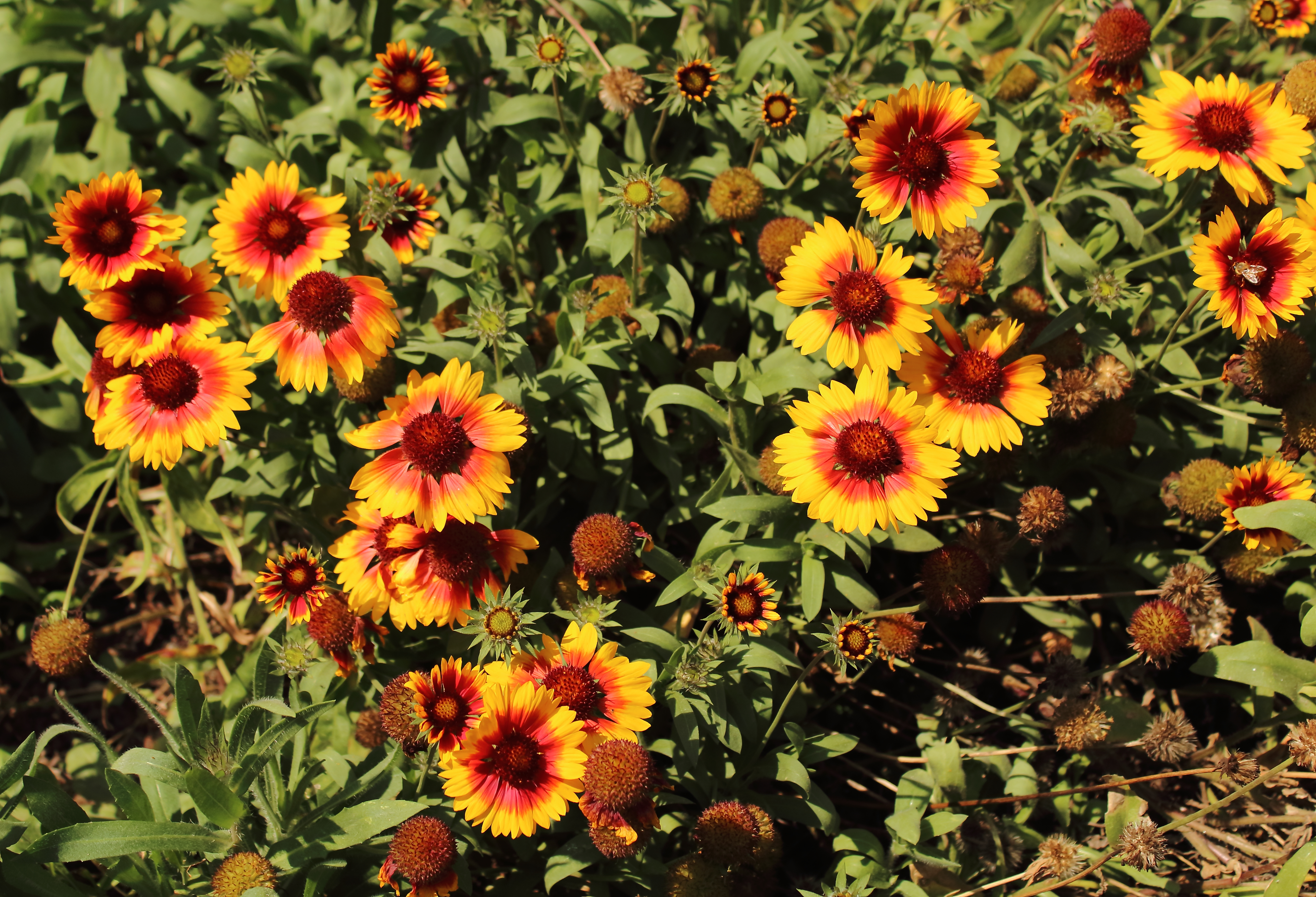 Plantas en la entrada del jardín botánico de Ciudad Universitaria, México.